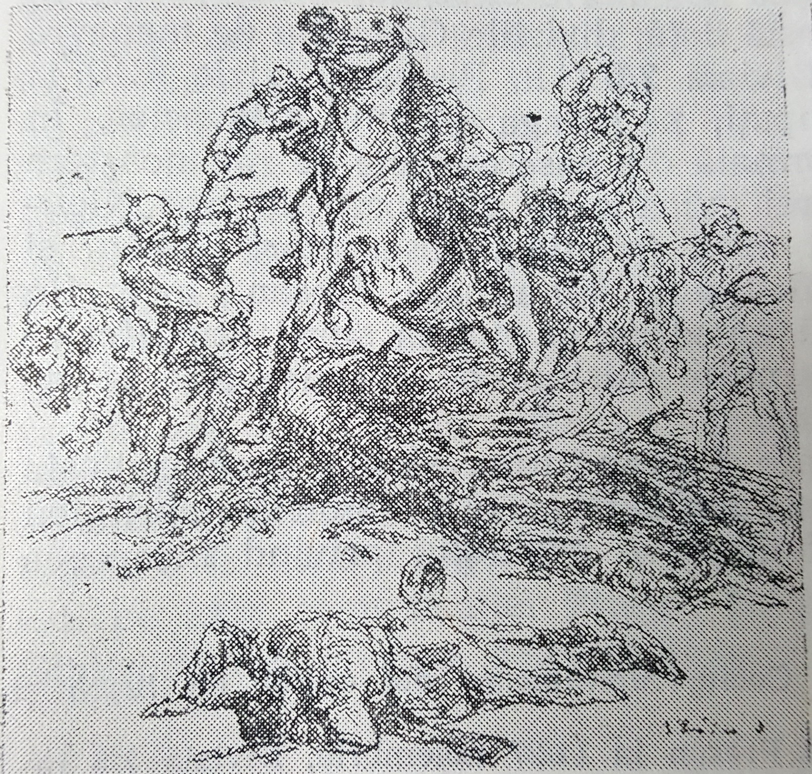 1916 - Sarja de la Prunaru desen de D Stoica